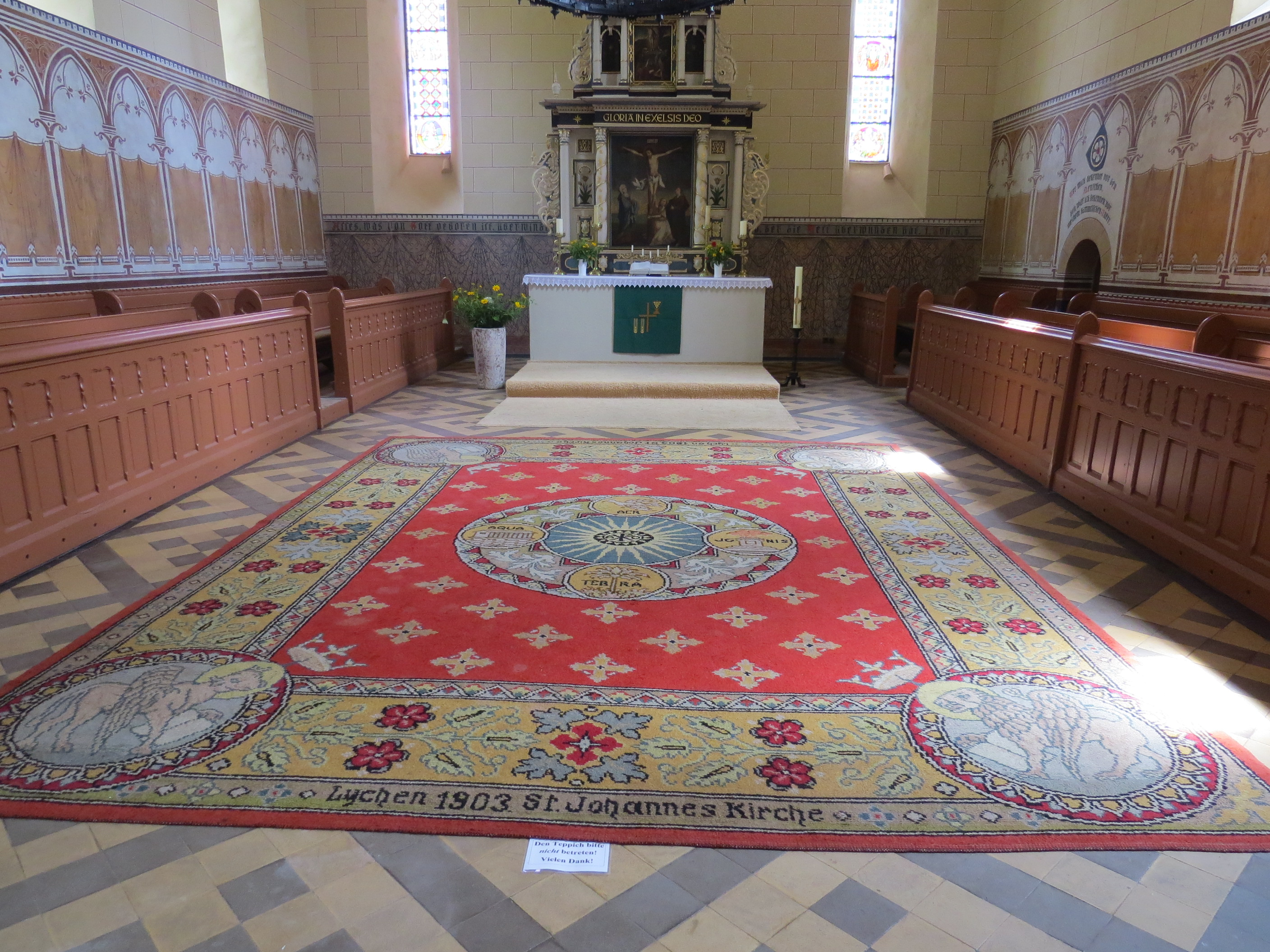 Inneres der ev. Kirche St. Johannes zu Lychen: Chorteppich